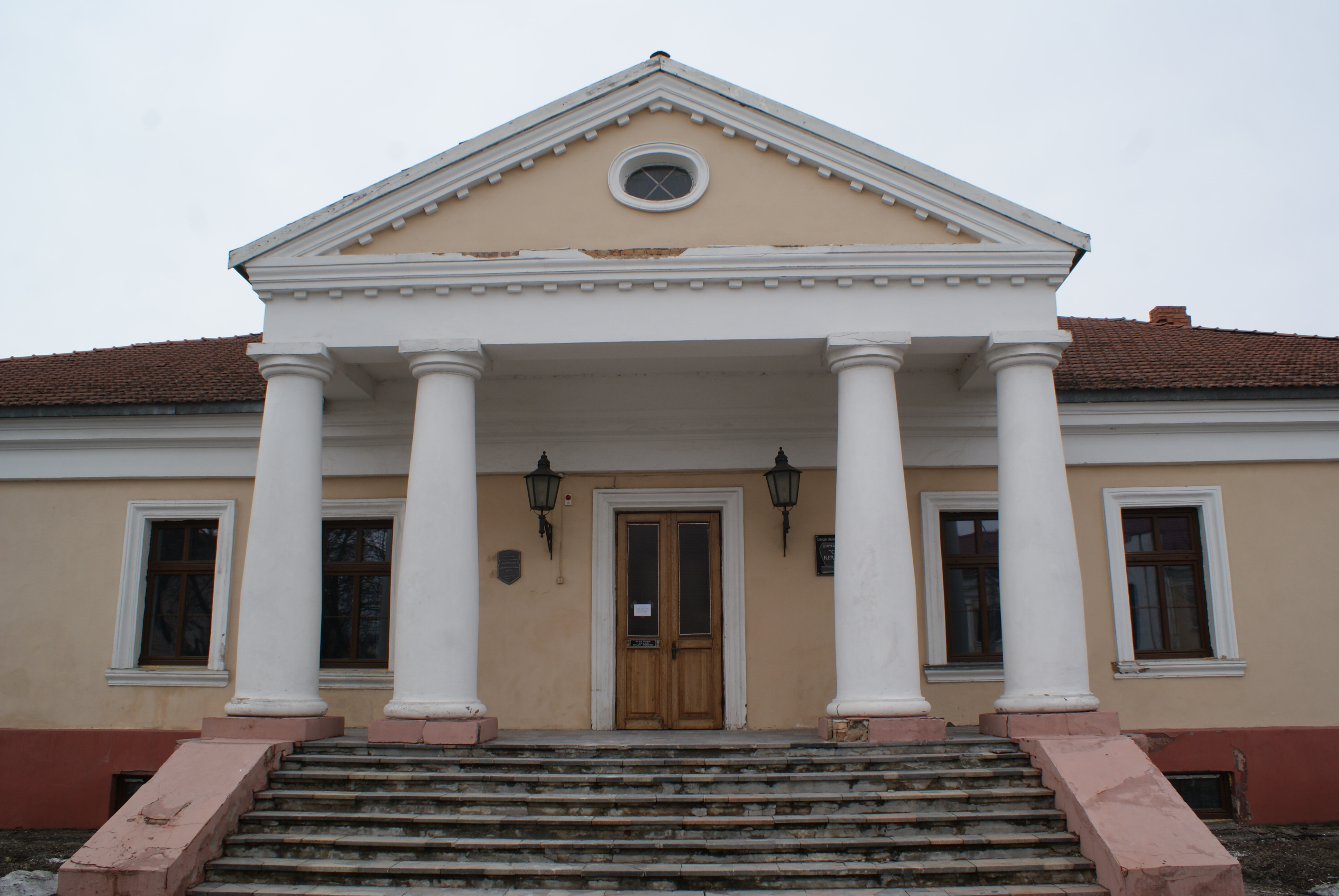 Слуцкі музей